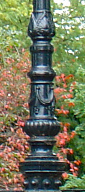 Muziekkoepel in het Houtmansplantsoen te Gouda (detail)